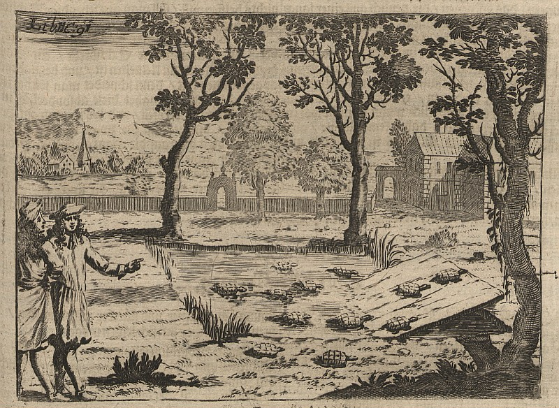 Original image description from the Deutsche Fotothek Fischwirtschaft & Schildkröte